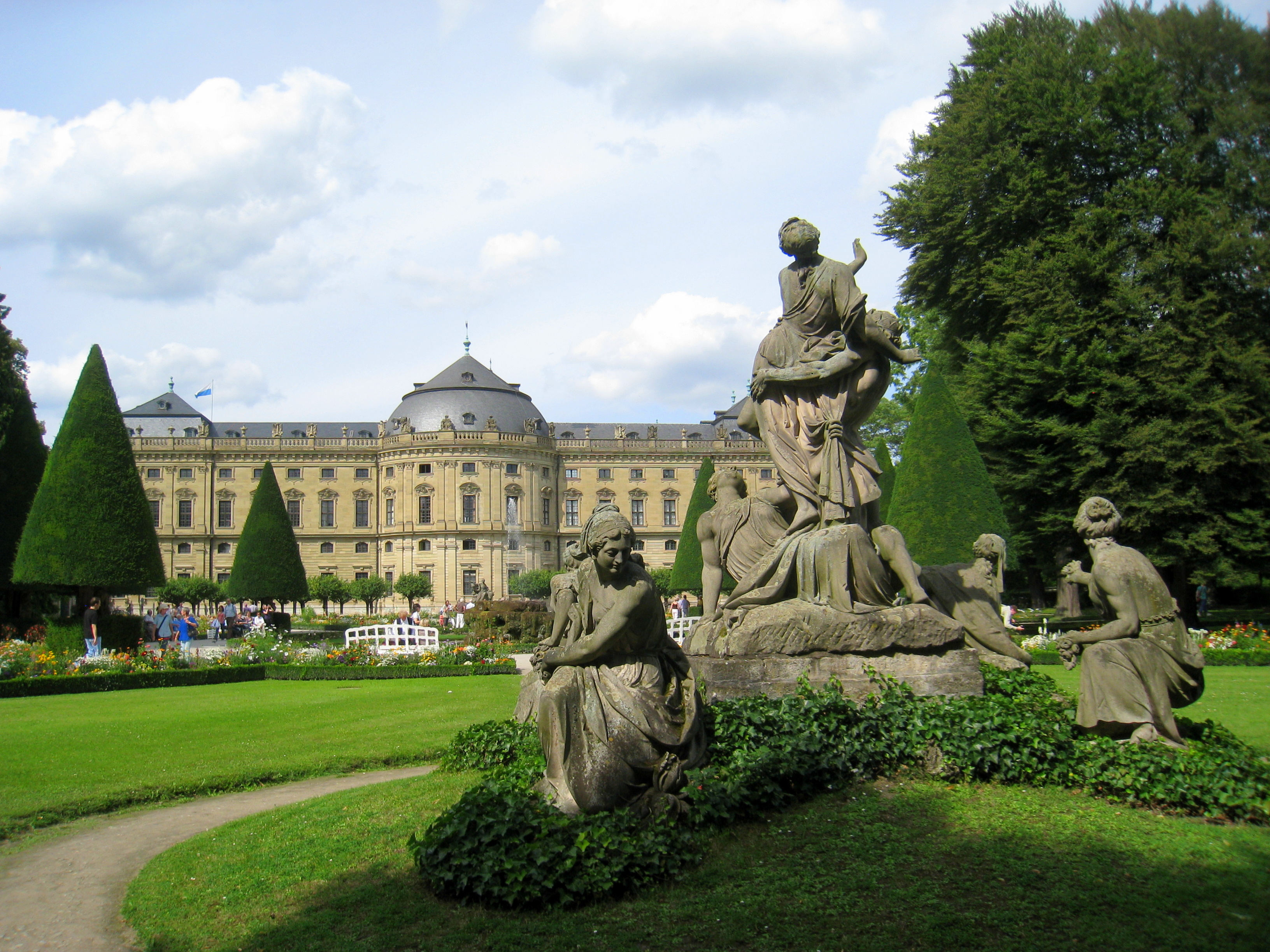 Würzburg Residence gardens, Würzburg, Germany. Raub der Proserpina